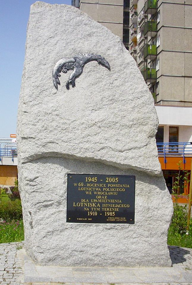 Pomnik projektu mgr Bogny Kozery na wrocławskim Gądowie.